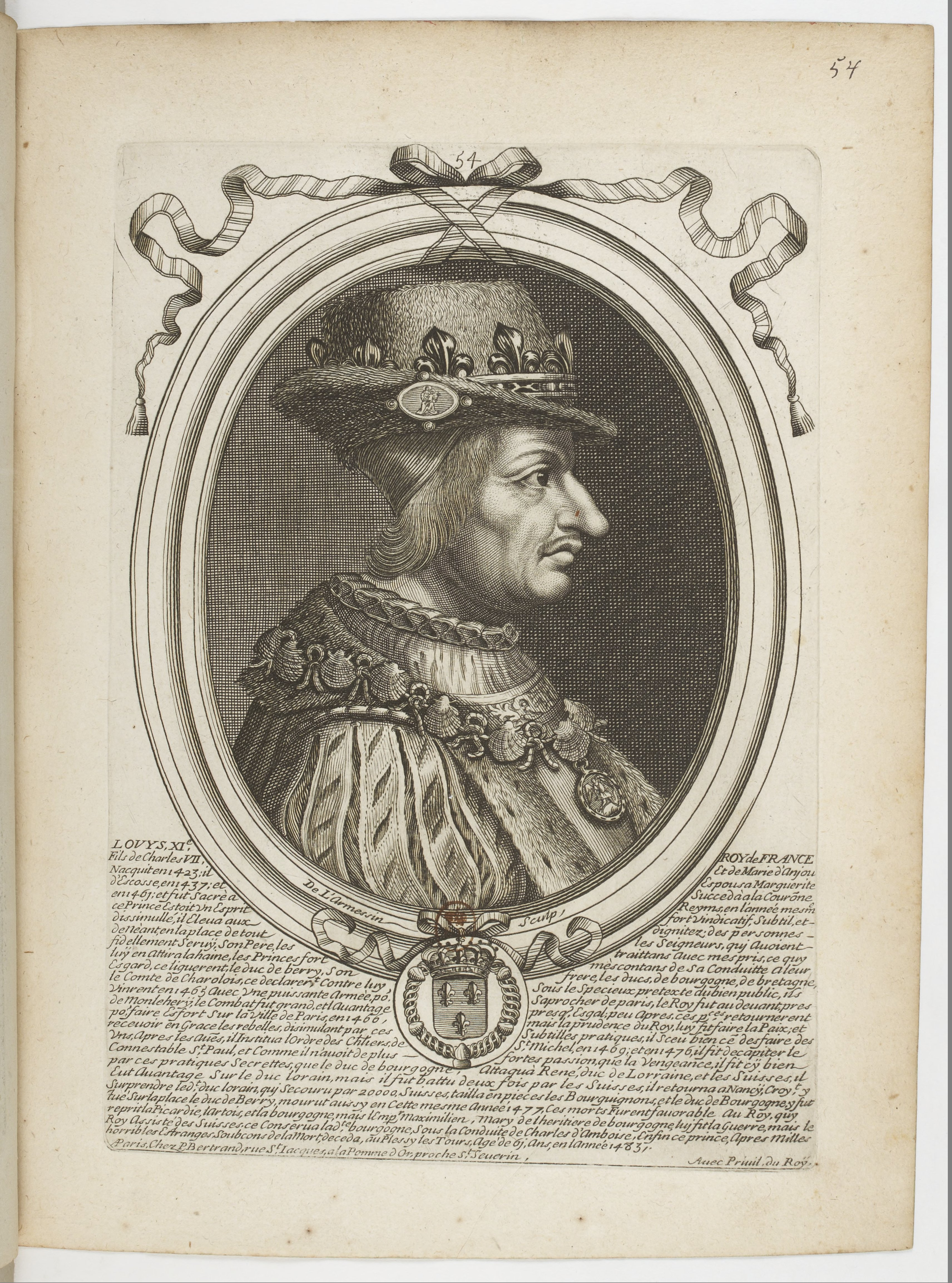 Les augustes représentations de tous les rois de France, depuis Pharamond jusqu'à Louis XIV,... avec un abrégé historique sous chacun, contenant leurs naissances, inclinations et actions plus remarquables pendant leurs règnes